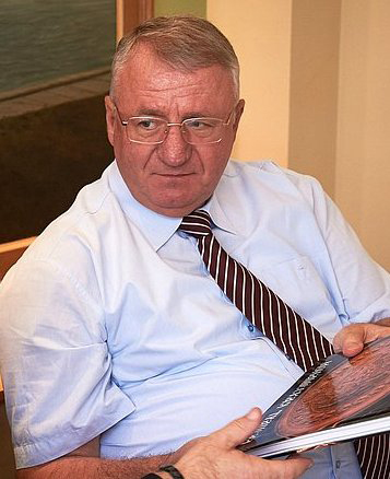 Лидер Сербской радикальной партии (СРП) Воислав Шешель